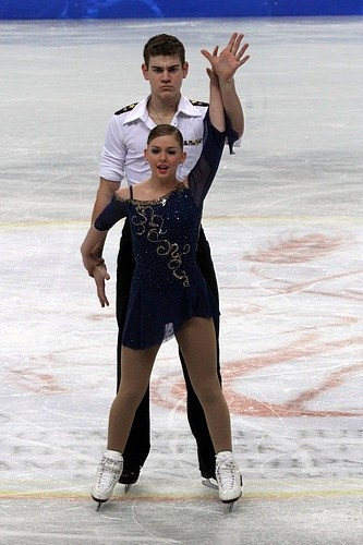 Хэвен Денни и Брендон Фрейзер (США) на чемпионате мира по фигурному катанию среди юниоров 2012